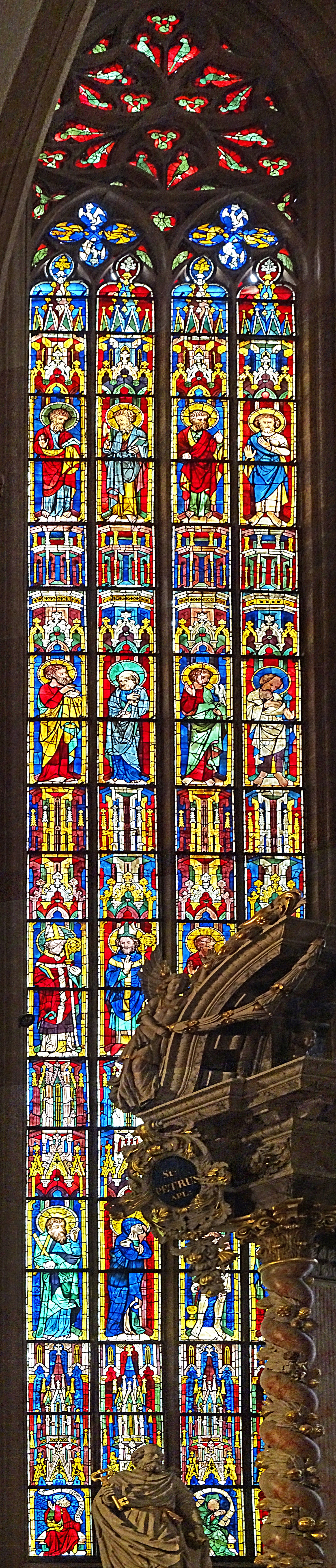 Apostelfenster (nIII) im Hohen Chor des Erfurter Doms St. Marien